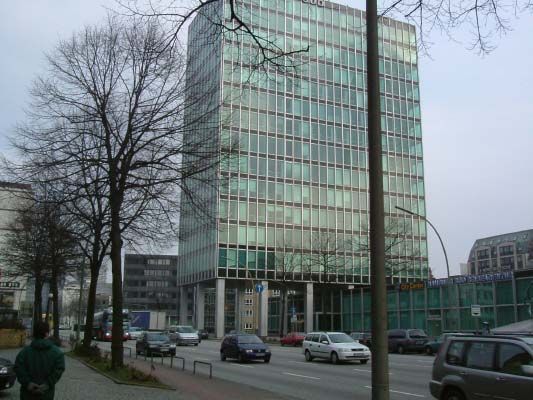 Willy-Brandt-Straße 59-61 in Hamburg